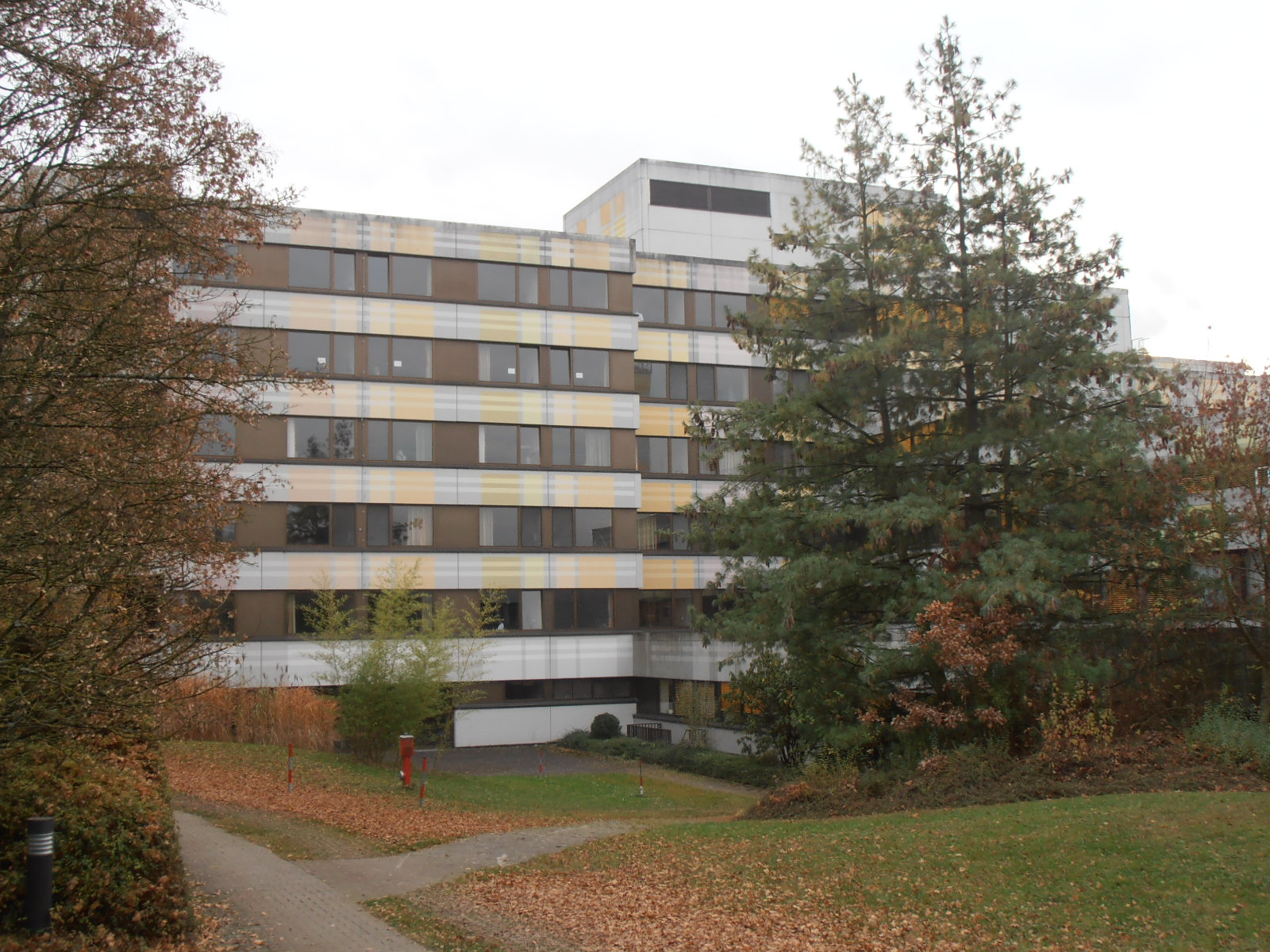 SLK-Klinikum am Plattenwald: Patiententrakt